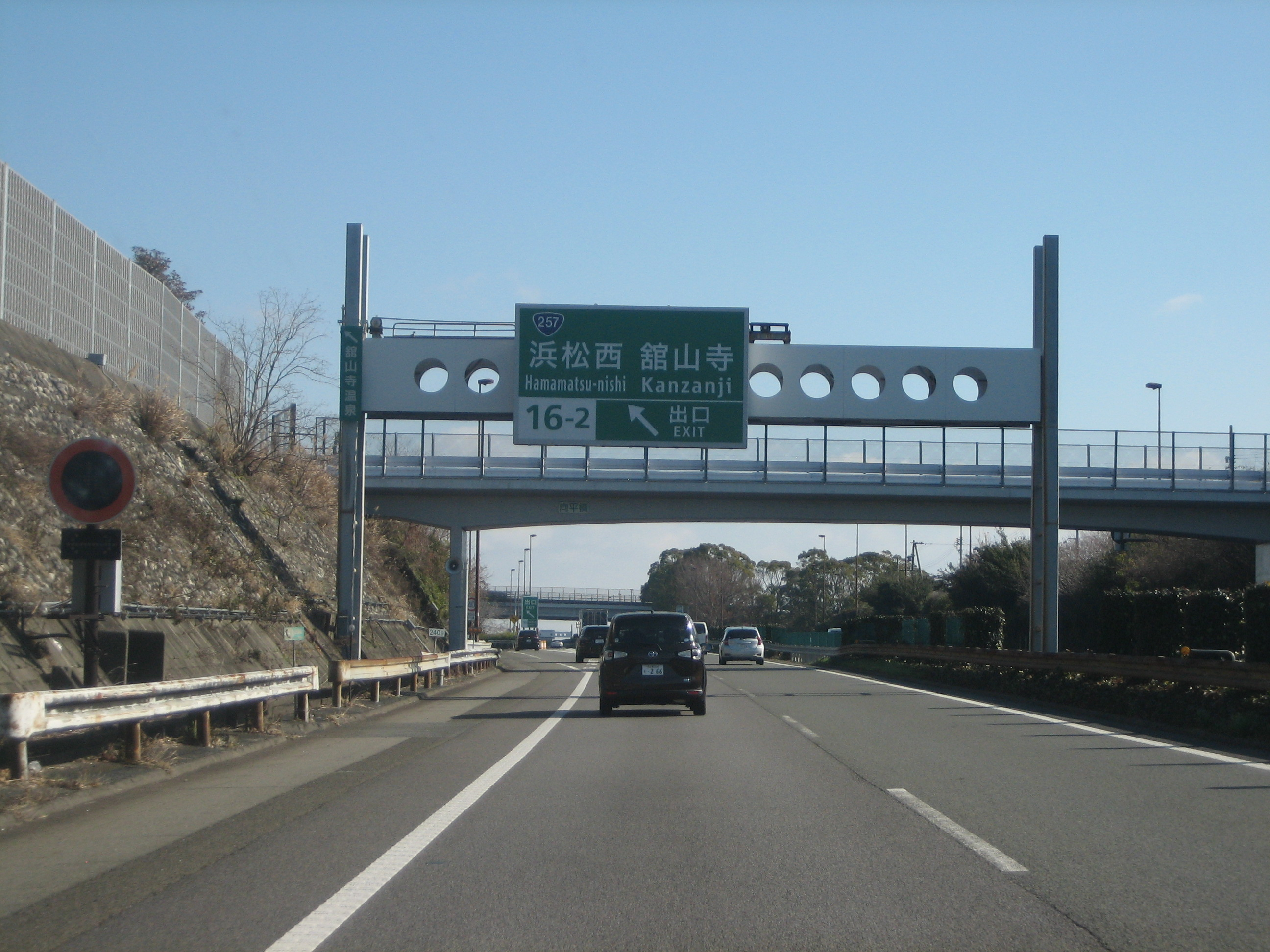 浜松西IC